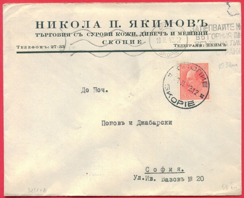 Плик с фирмата на скопския кожар Никола Якимов